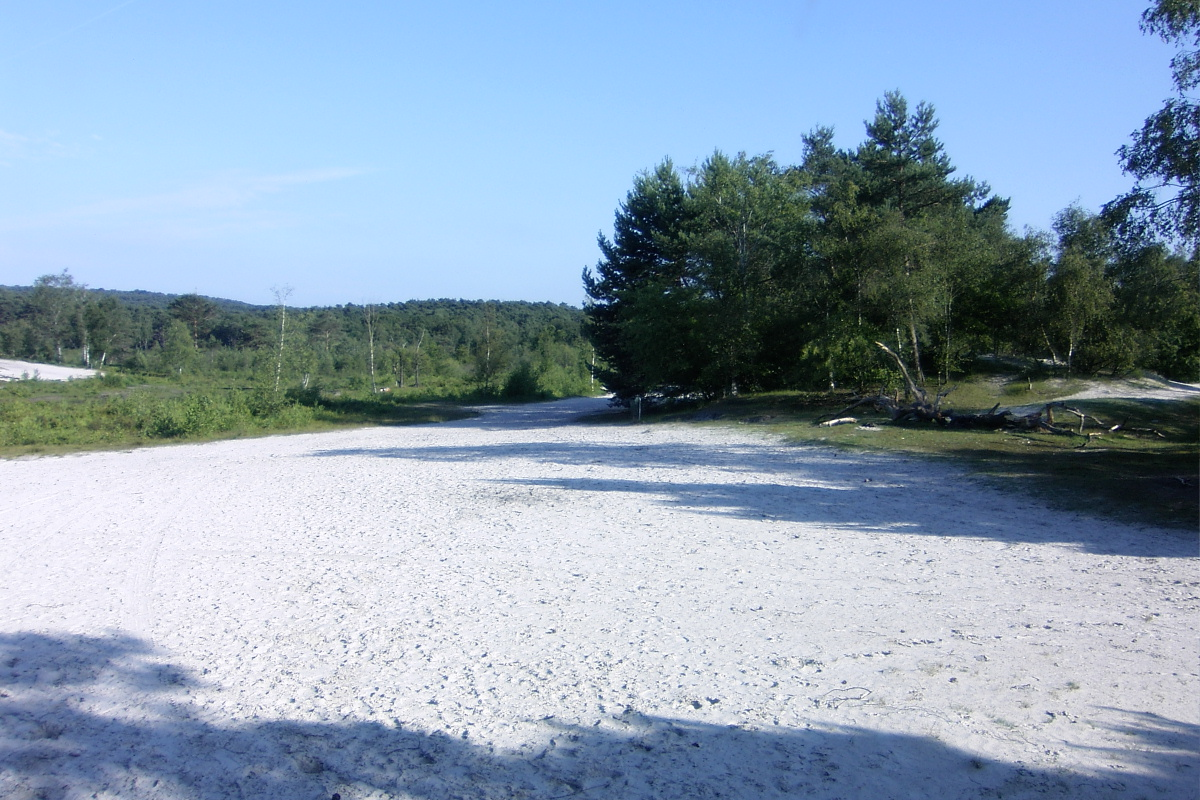 Brunssummerheide